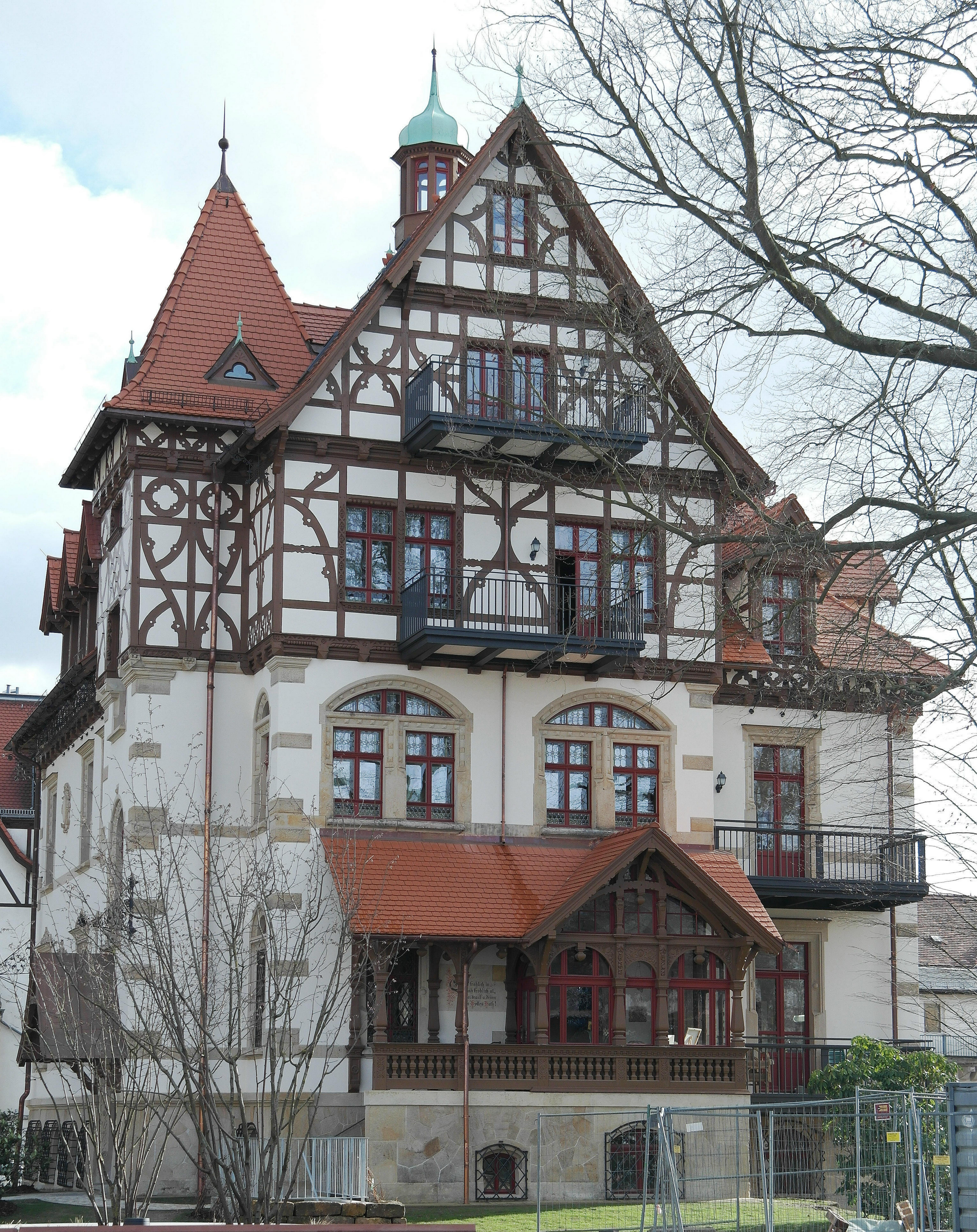 Dresden-Weißen Hirsch: Villa Heinrichshof - Wohnhaus der Familie Lahmann